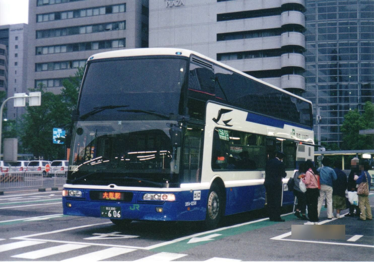 JR Bus Kanto D654-02506 "Seishun Dream Osaka" Mitsubishi KL-MU612TX at Osaka Sta.